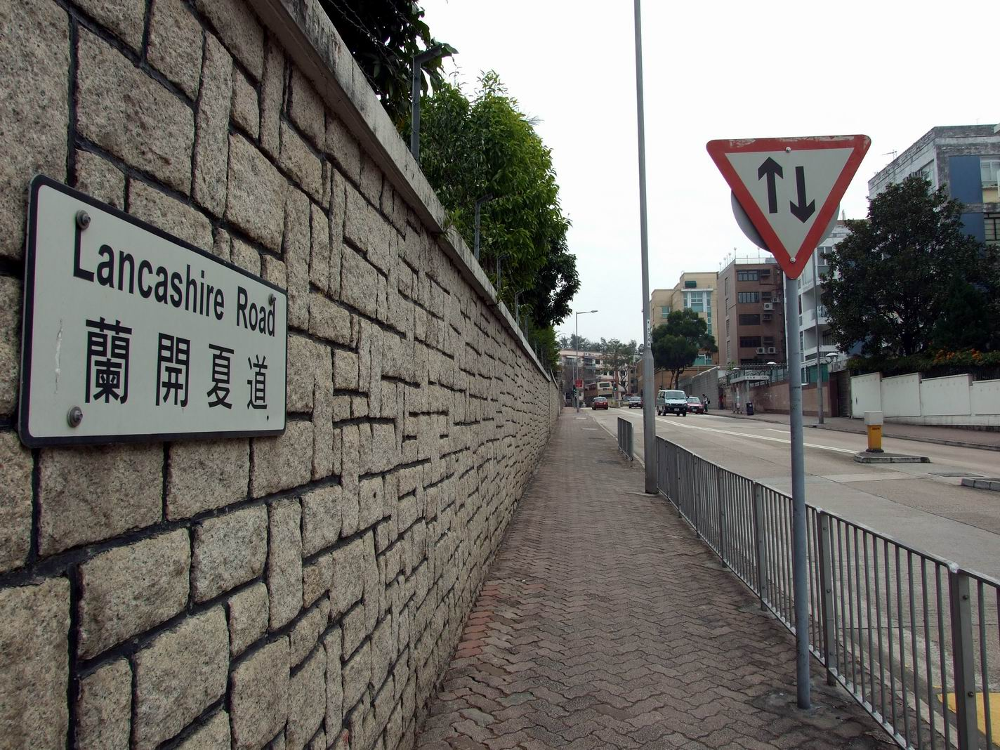 蘭開夏道